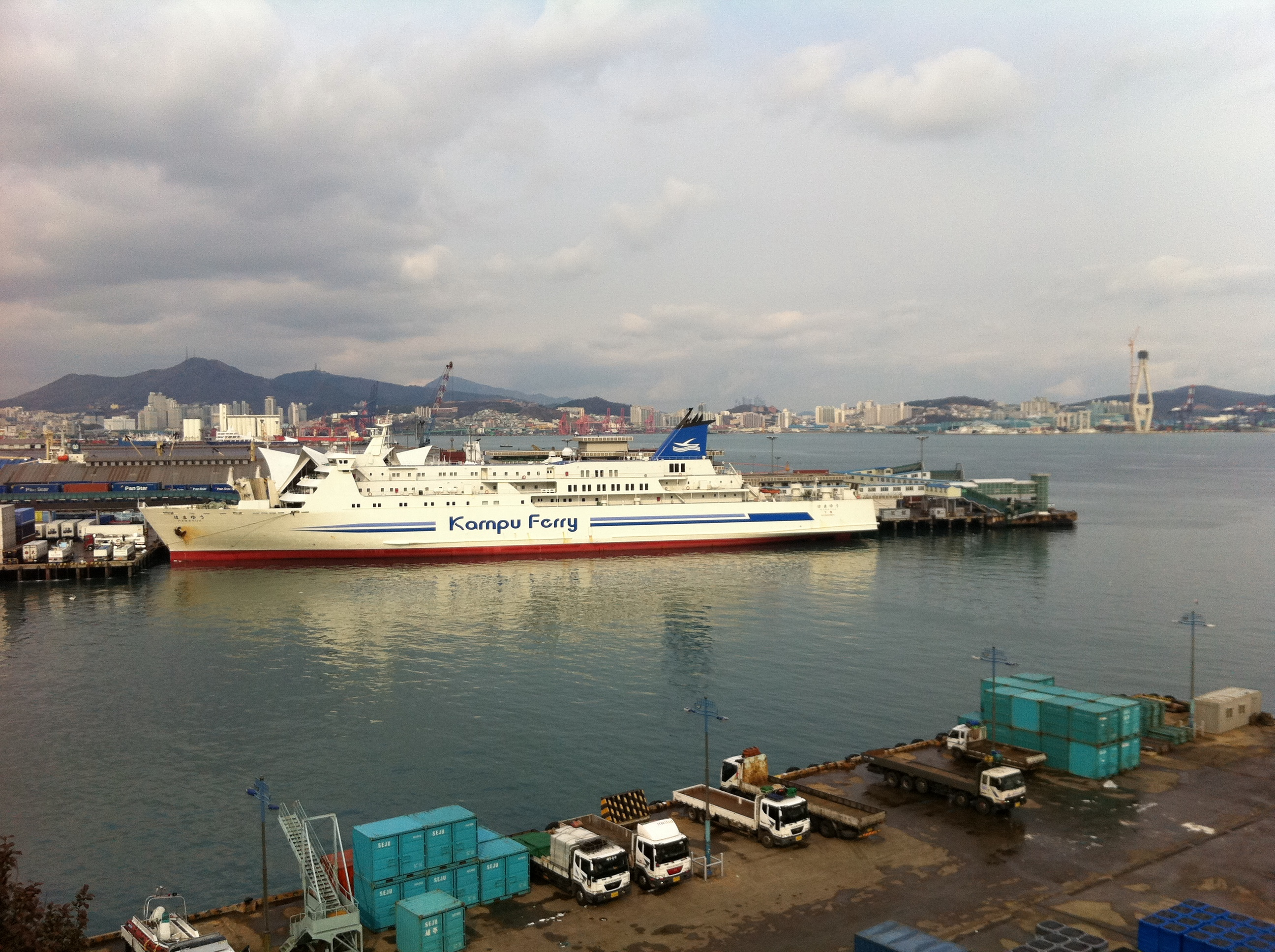 Busan terminal